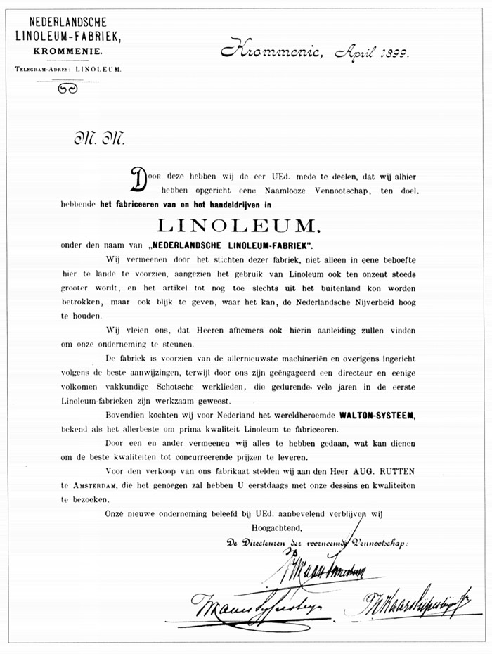 Aanbevelingsbrief van de directie der Nederlandsche Linoleum Fabriek uit 1899